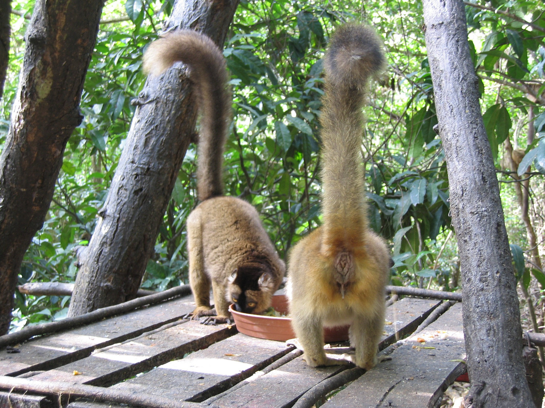 Nourriture pour les makis (îlot Mbouzi, Mayotte)